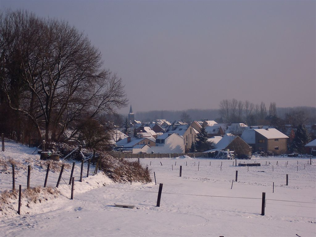 winters zicht op Teralfene